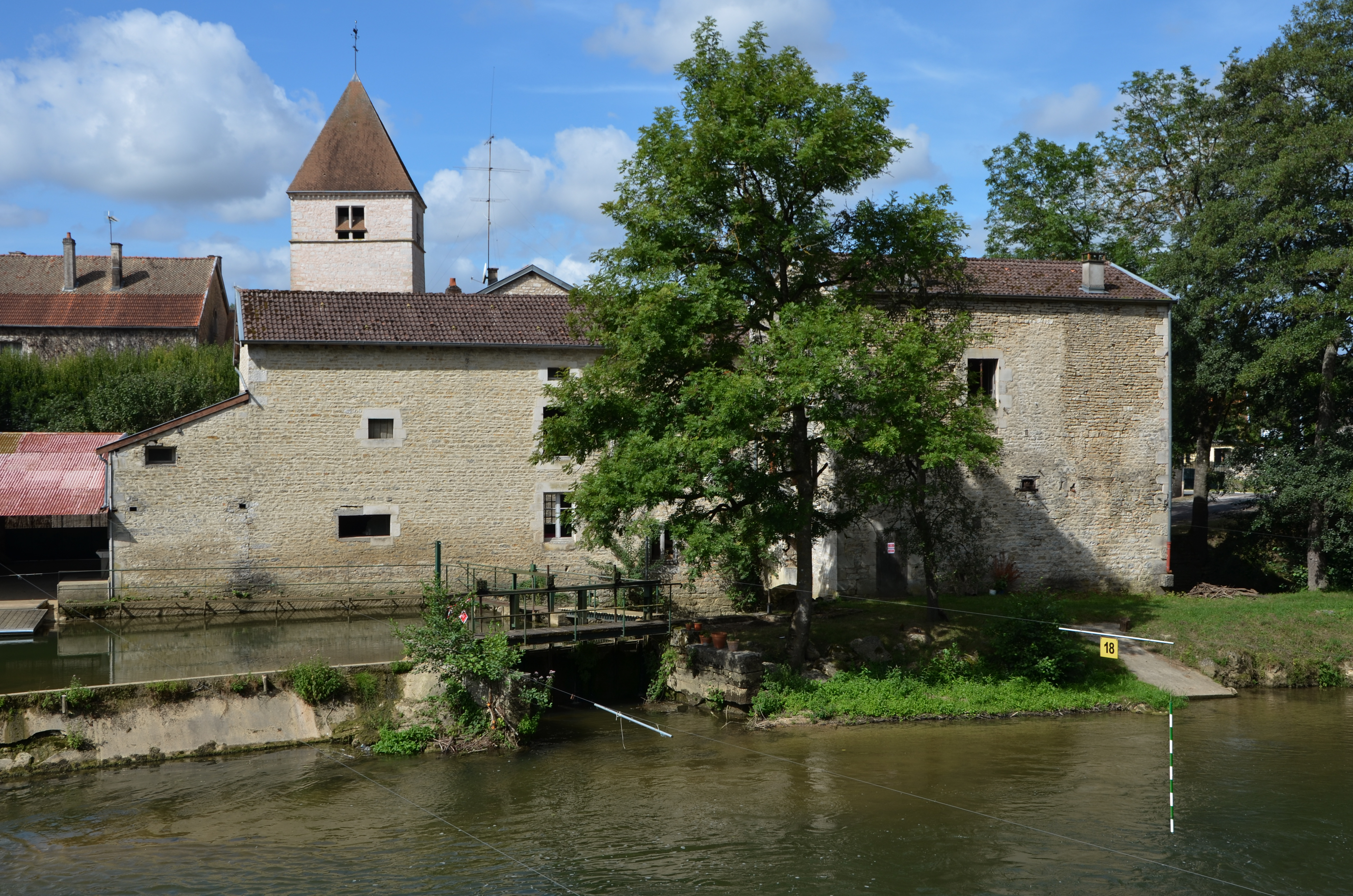 Le moulin, La Marne à Choignes, Haute-Marne, Champagne-Ardennes, France